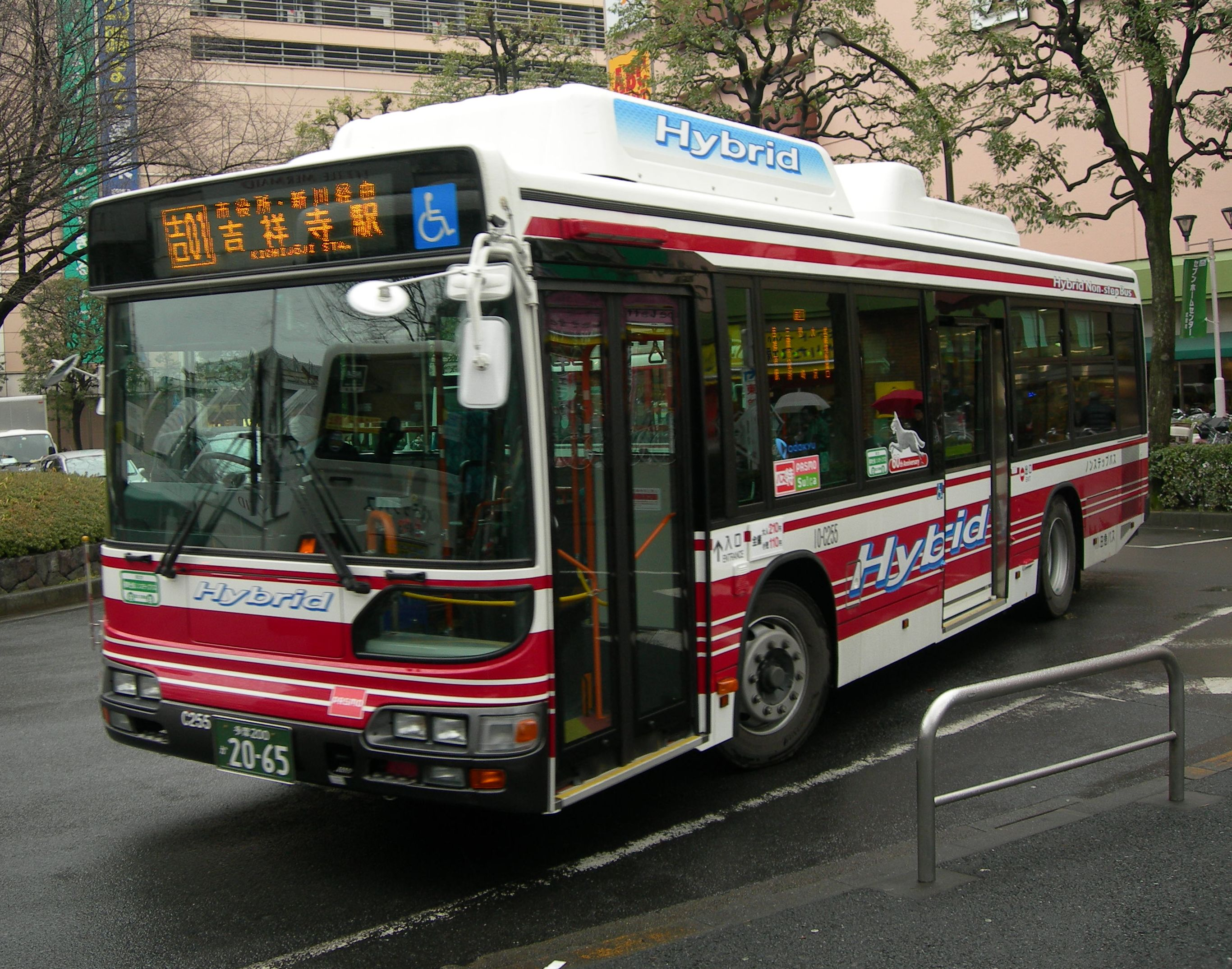 小田急バス吉祥寺営業所 路線バス